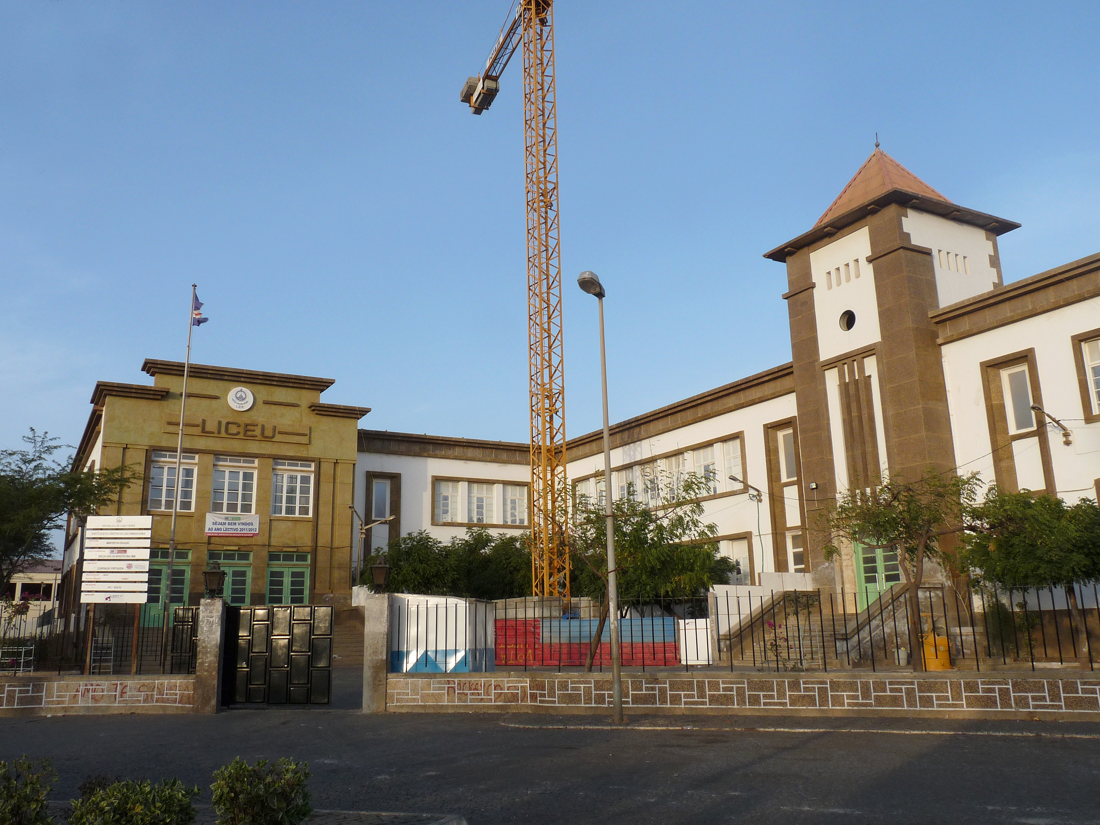 Praia (Cap-Vert) : Liceu Domingos Ramos (en travaux)